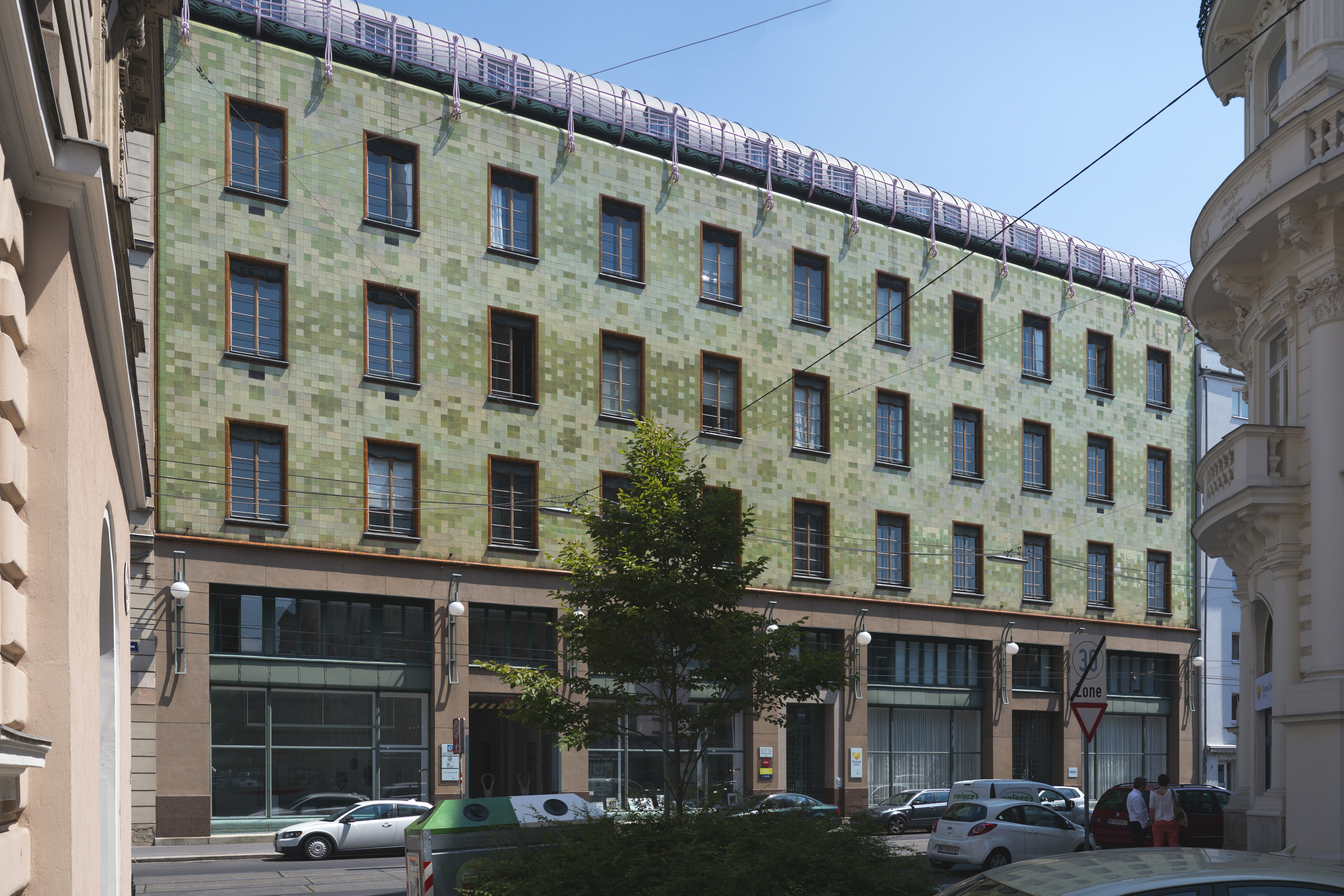 Ungargasse Portois und Fix